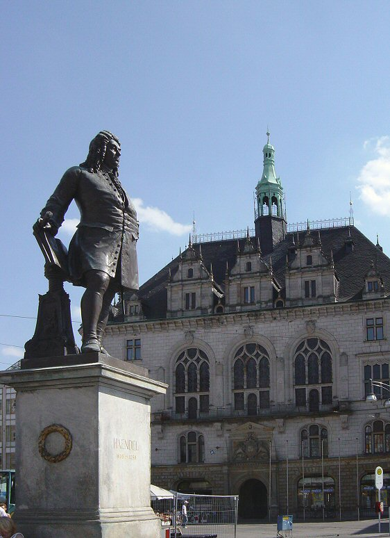 Halle an der Saale: Händelmonument met op de achtergrond het Stadthaus. Eigen foto, augustus 2004